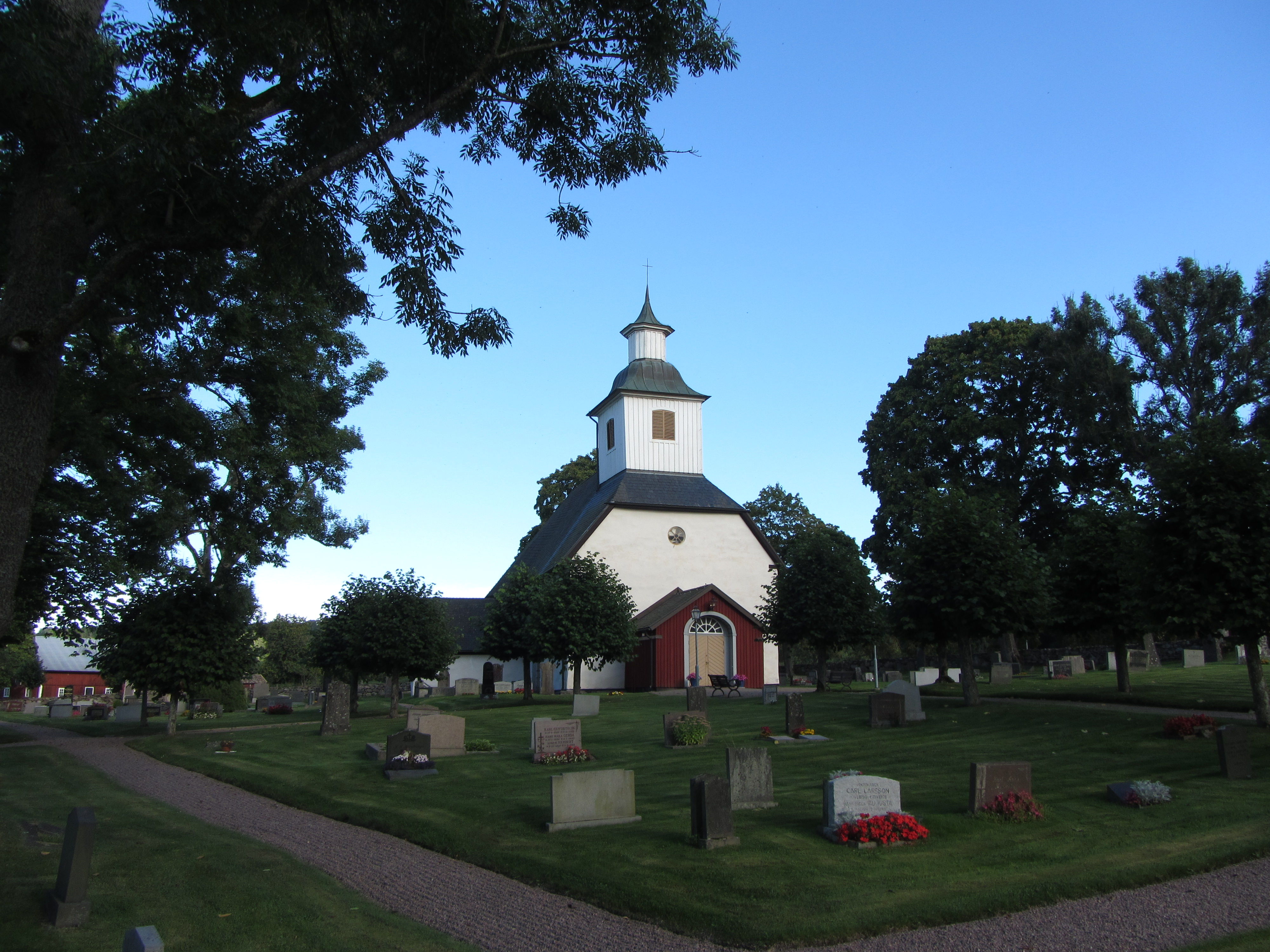 Lerdala kyrka norr om Varnhem och mellan Varnhem och Timmersdala i Västergötland (mellan Skara och Skövde).